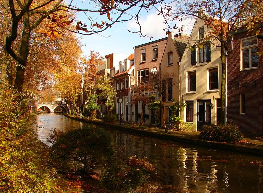 De Oudegracht te Utrecht, ter hoogte van de Twijnstraat.